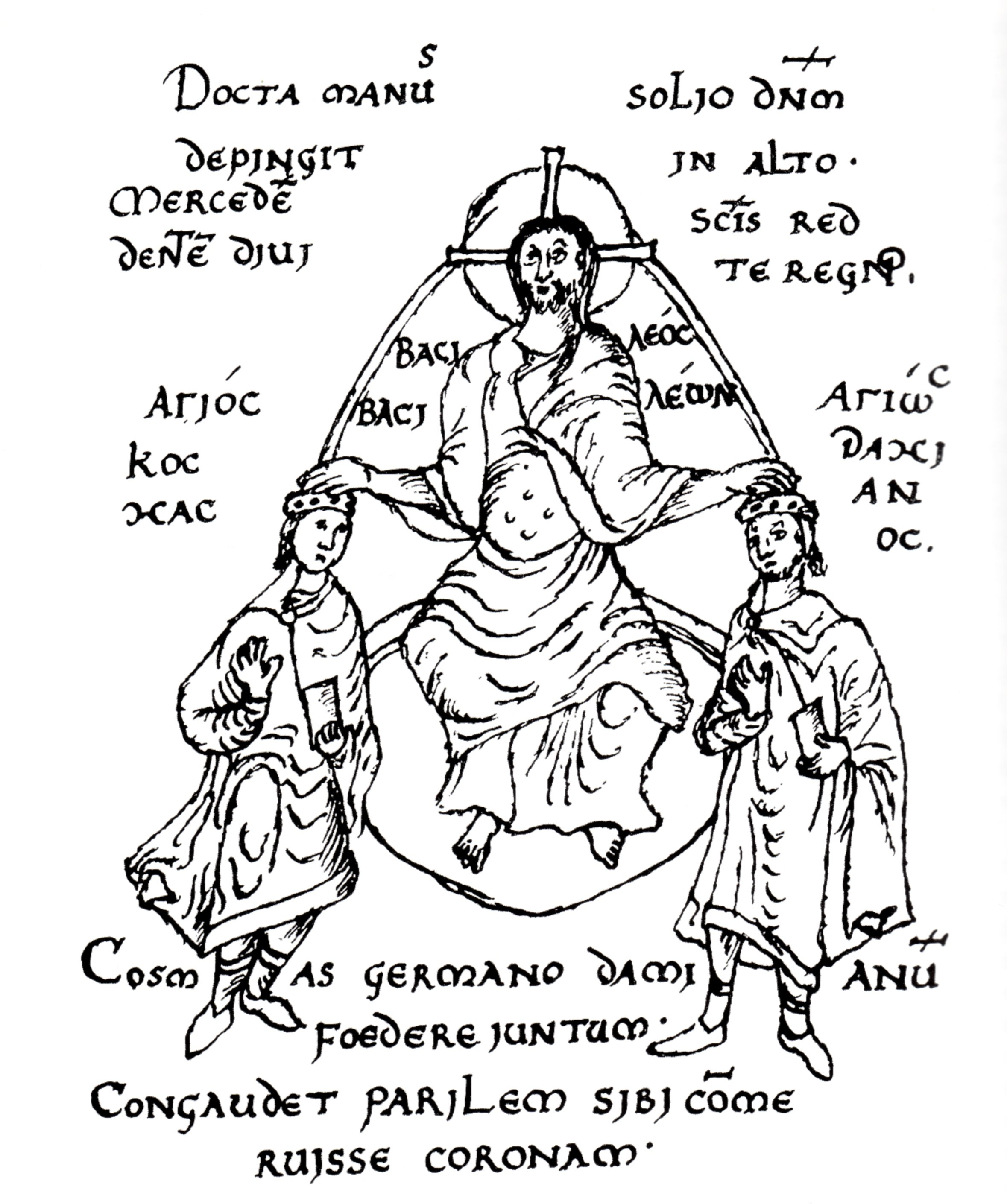 Christus krönt die Heiligen Cosmas und Damian, Umzeichnung des 17. Jahrhunderts einer Buchmalerei des 10. Jahrhunderts aus dem Skriptorium der Abtei Fulda